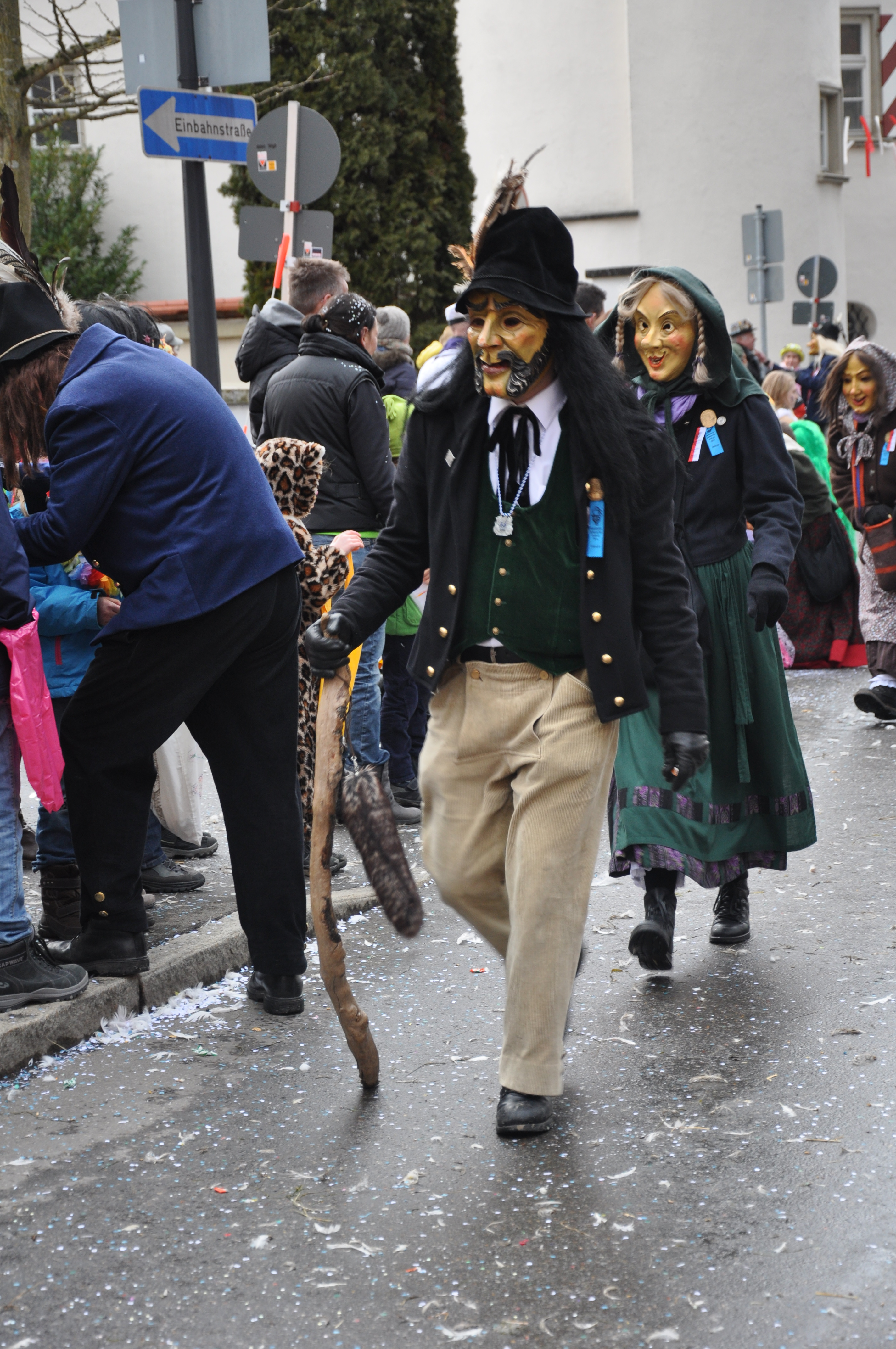 Ravensburger Schwarze-Veri-Zunft e. V., Ravensburg; Narrenfigur: Räuber (Einzelmaske: Xaver Hohenleiter, der Schwarze Veri) Fotografiert beim Ringtreffen des Alemannischen Narrenrings (ANR) 2014 in Weingarten; Narrensprung am 9. Februar 2014